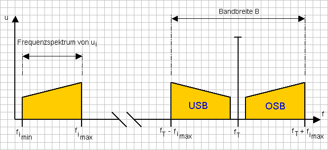 Bandbreite AM mit Frequenzspektrum